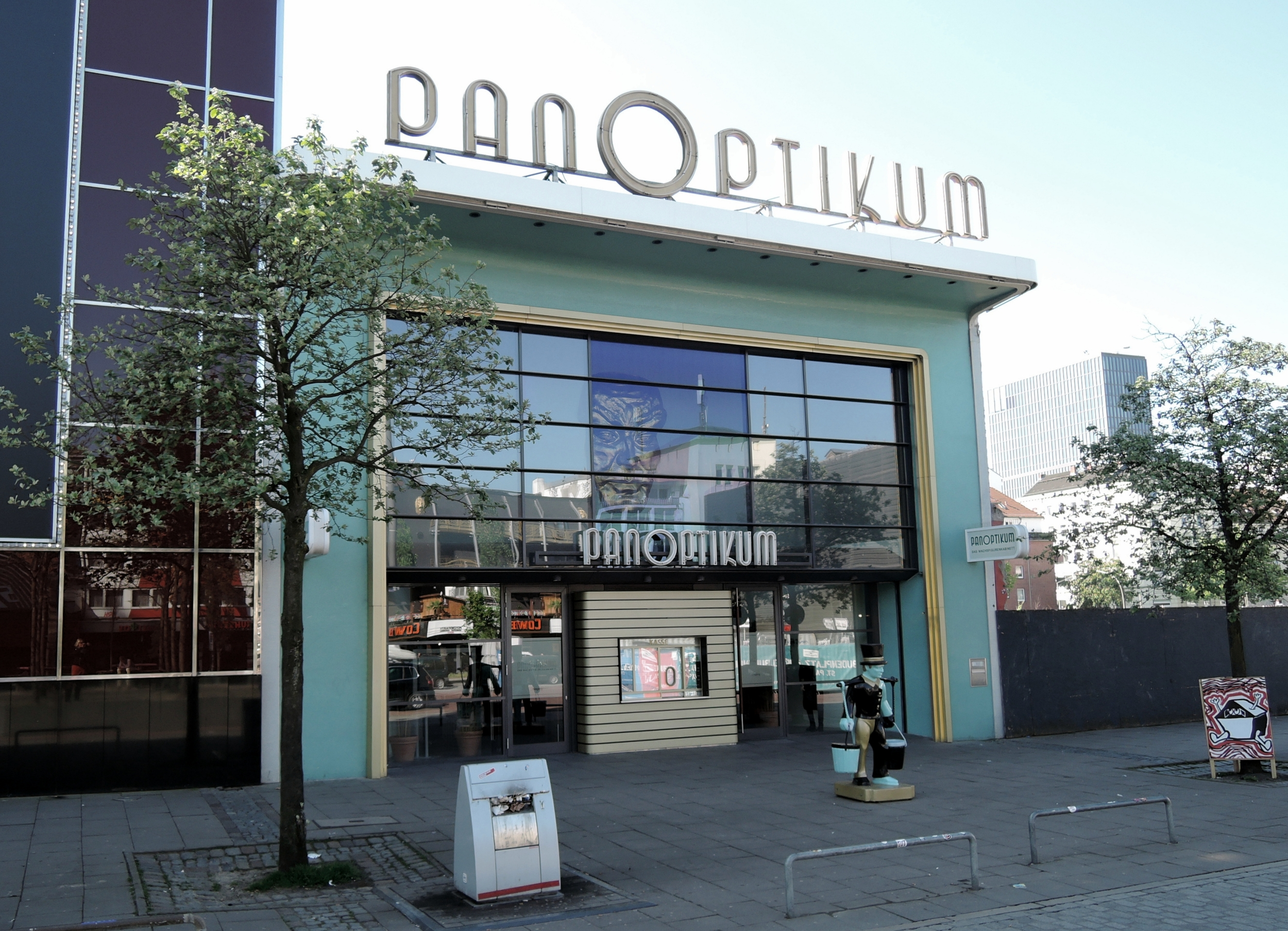 Das Wachsfigurenkabinett "Panoptikum" im Hamburg, Spielbudenplatz/ Reeperbahn. Foto Vorderseite mit Haupteingang, April 2019